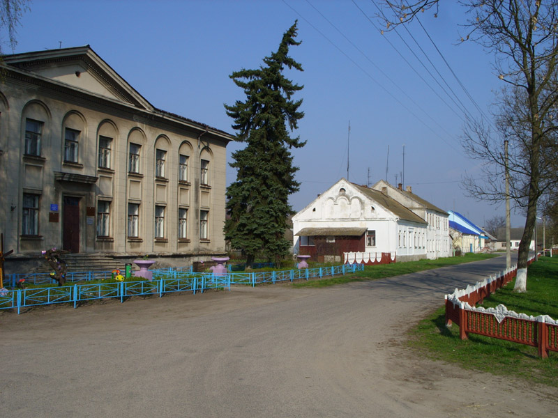 Былы дом піянераў. Цяпер дом культуры Антопальскага сельсавету